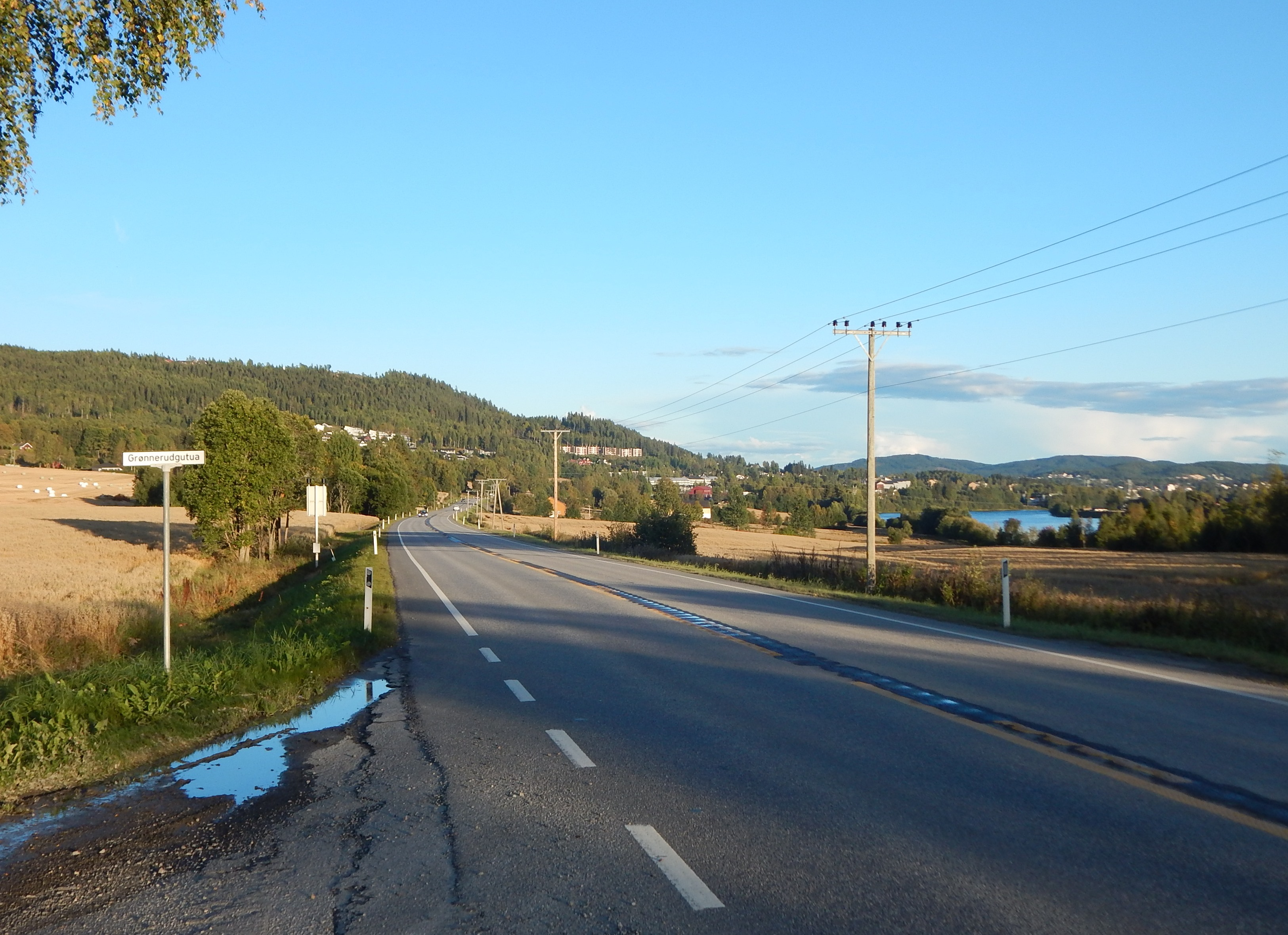 Oslovegen (FV198, tidl. FV250) vest for Kongsvinger by